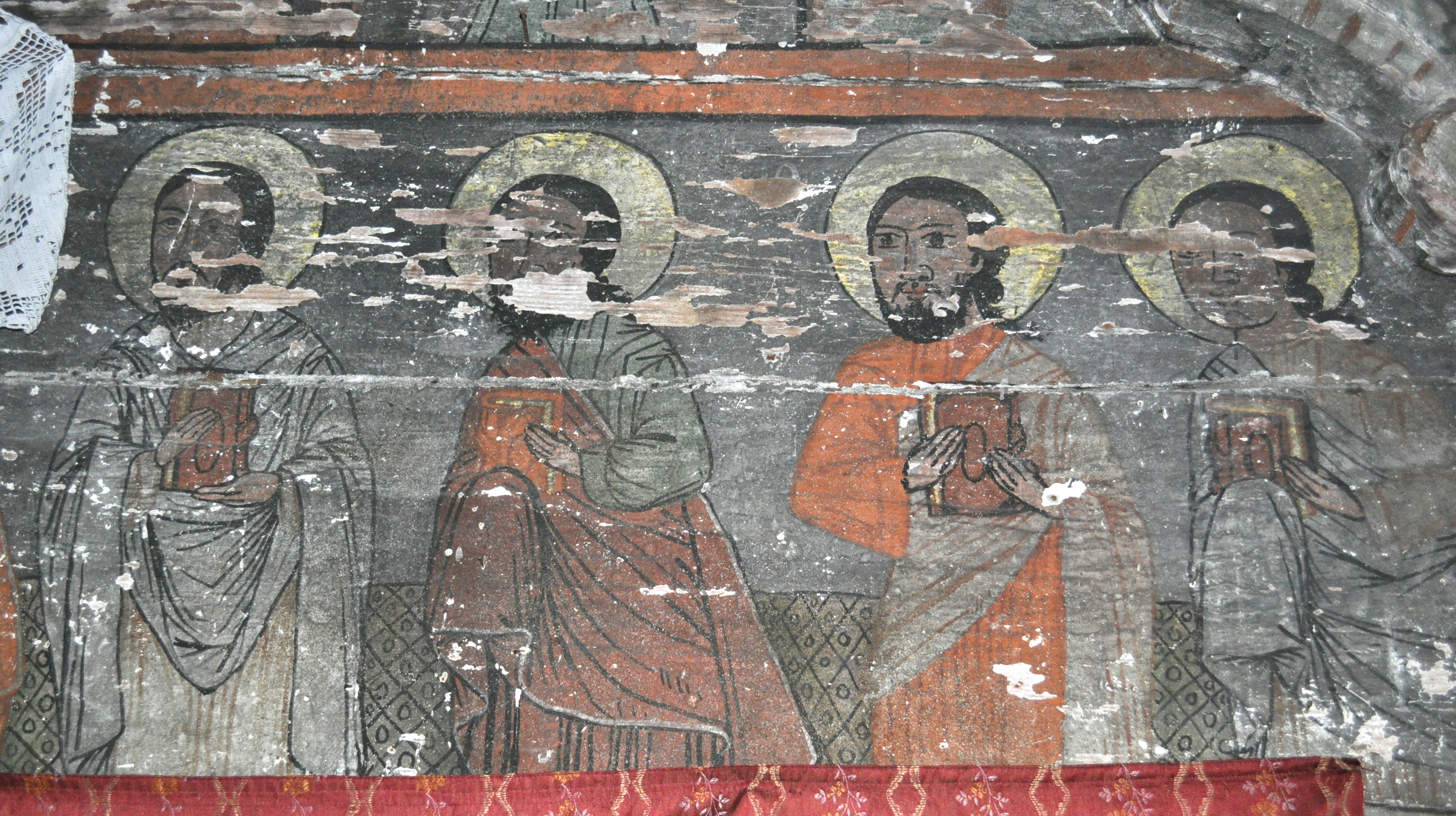 Biserica de lemn din Stolna, județul Cluj